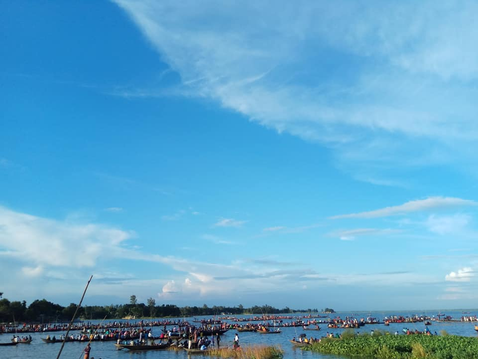 সুজানগরের গাজনার বিল